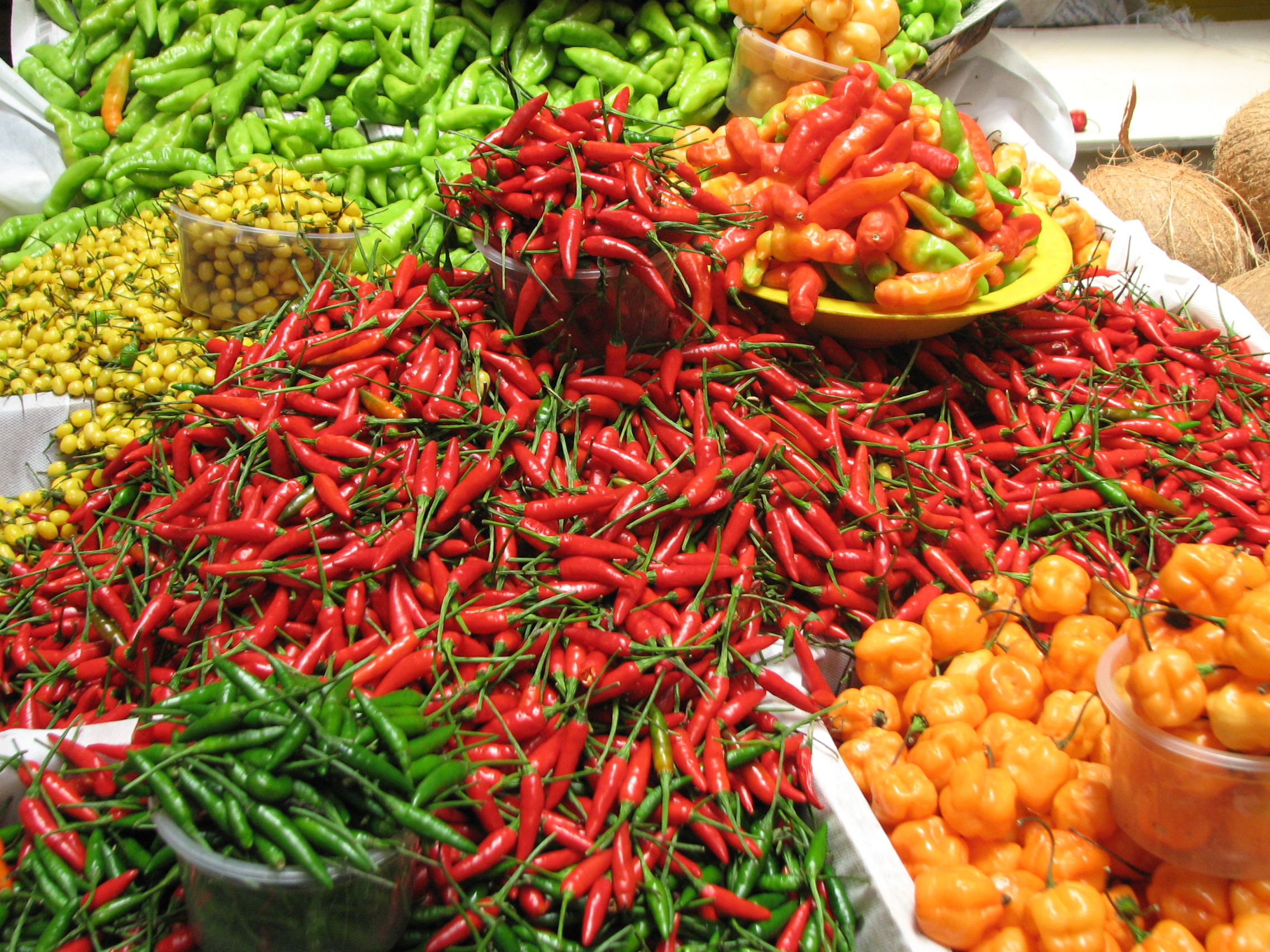 Pimentas descansam sua exuberância no Mercado Albano Franco, Aracaju.